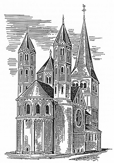 Rekonstruktionszeichnung der Probsteikirche Oberpleis, veröffentlicht in der Zeitschrift für christliche Kunst, 5. Jahrgang (1892), Spalte 120